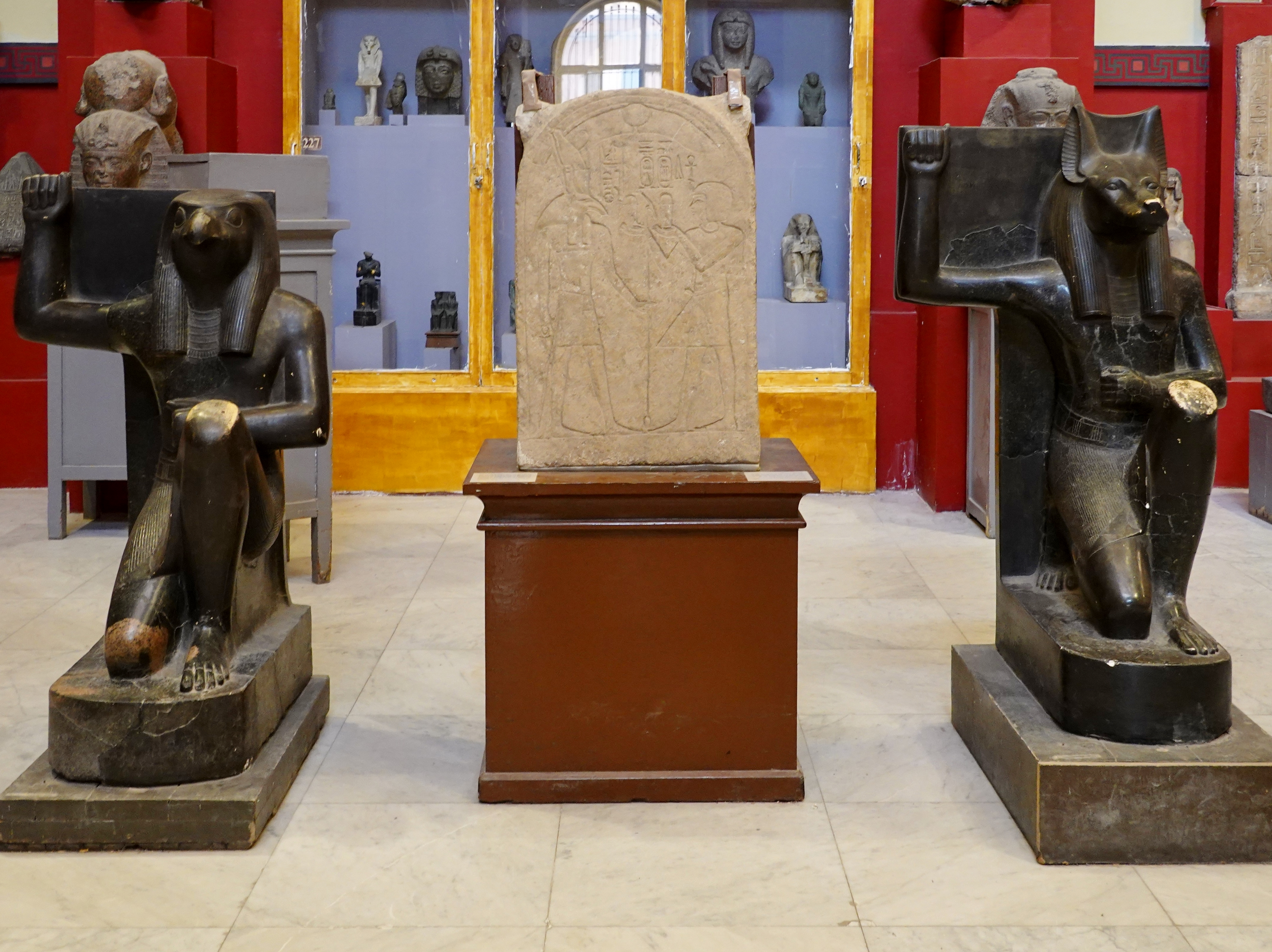 Stele aus Kalkstein mit der Darstellung des Königs Ramses I. vor dem Gott Seth, zwischen Statuen der Götter Horus und Seth, ausgestellt im Ägyptischen Museum in Kairo, Ägypten